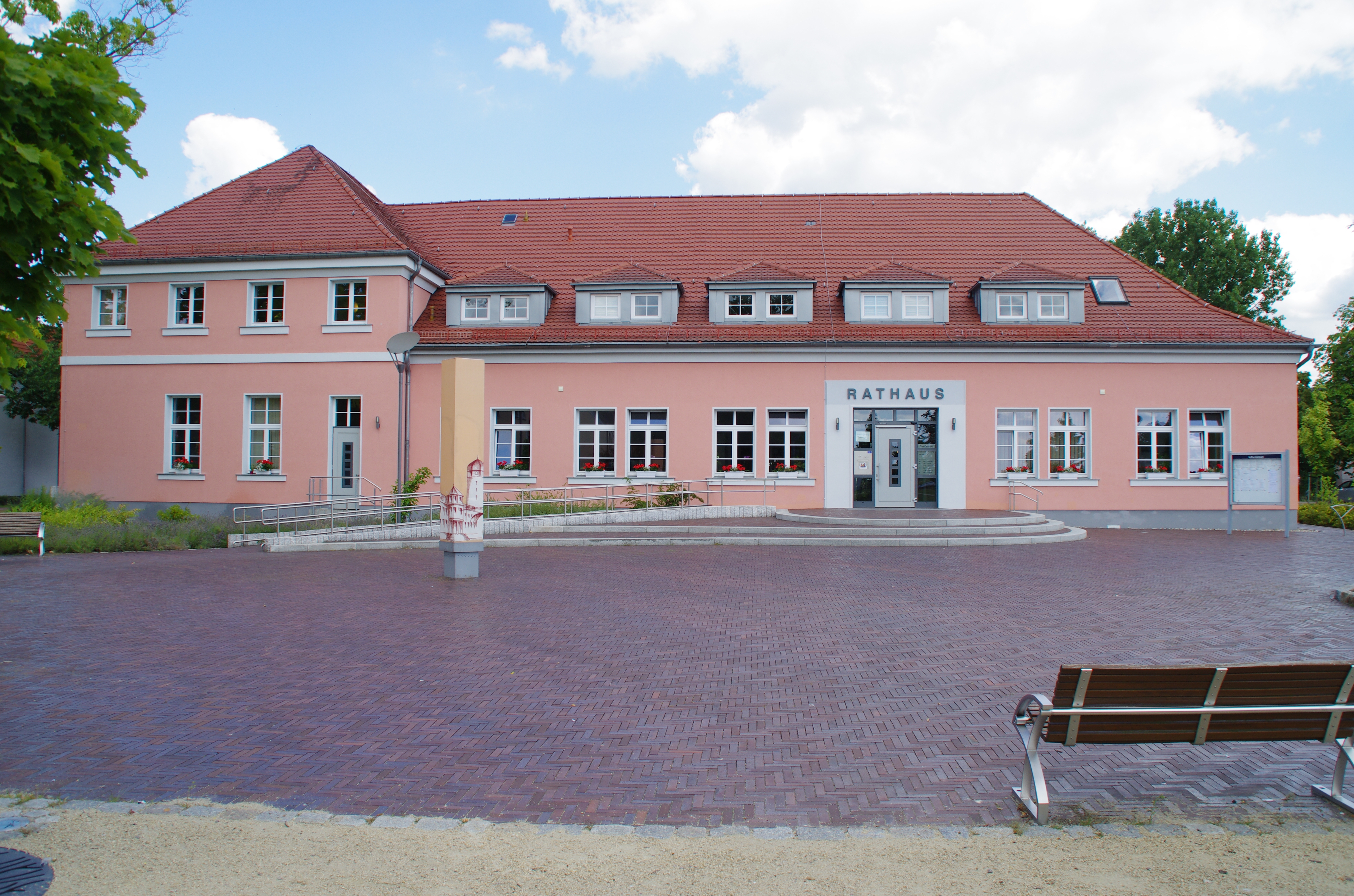 Premnitz in Brandenburg. Das Rathaus von Premnitz.